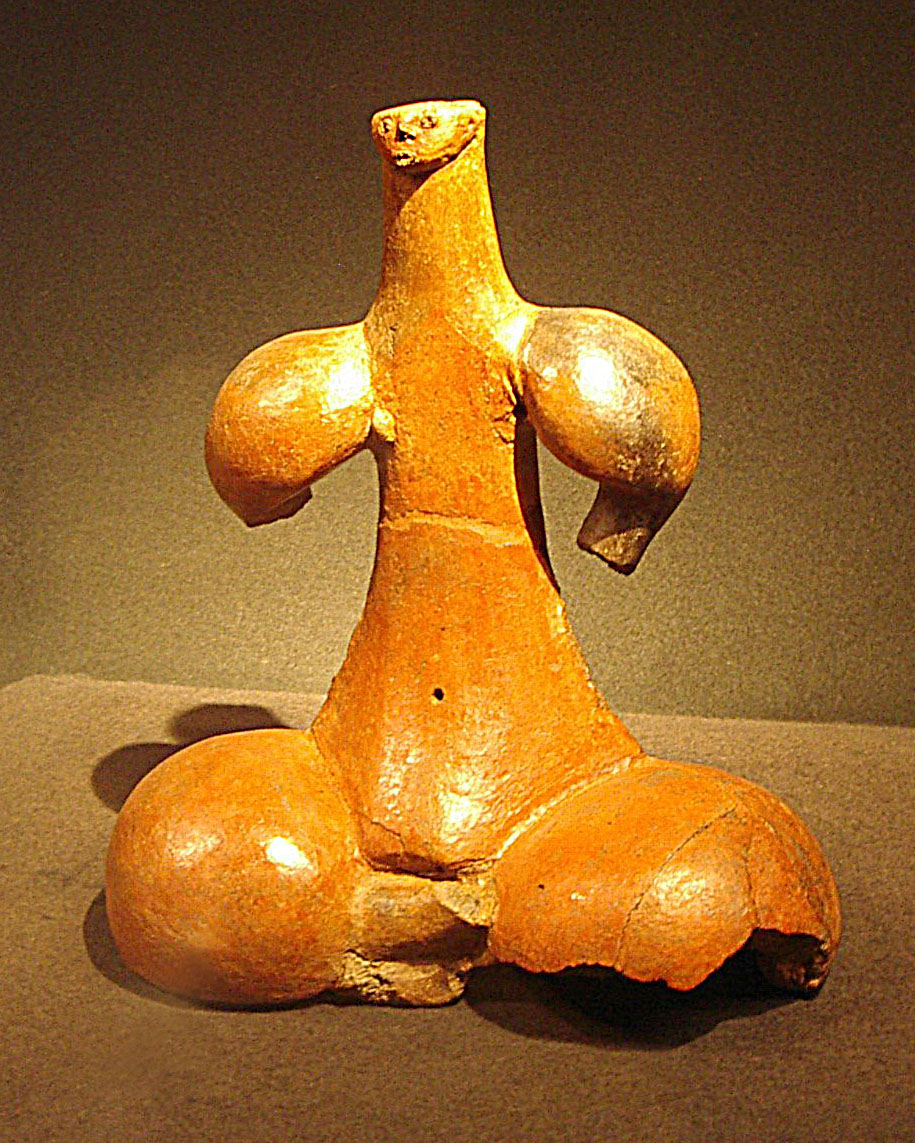 Der Ídolo de Chil auch Ídolo de Tara genannt ist eine 26 cm hohe, 20 cm breite und 10 cm tiefe Tonfigur. Sie wurde auf der Insel Gran Canaria gefunden und stammt aus der Zeit vor der Eroberung der Kanarischen Inseln im Auftrag der Krone von Kastilien.